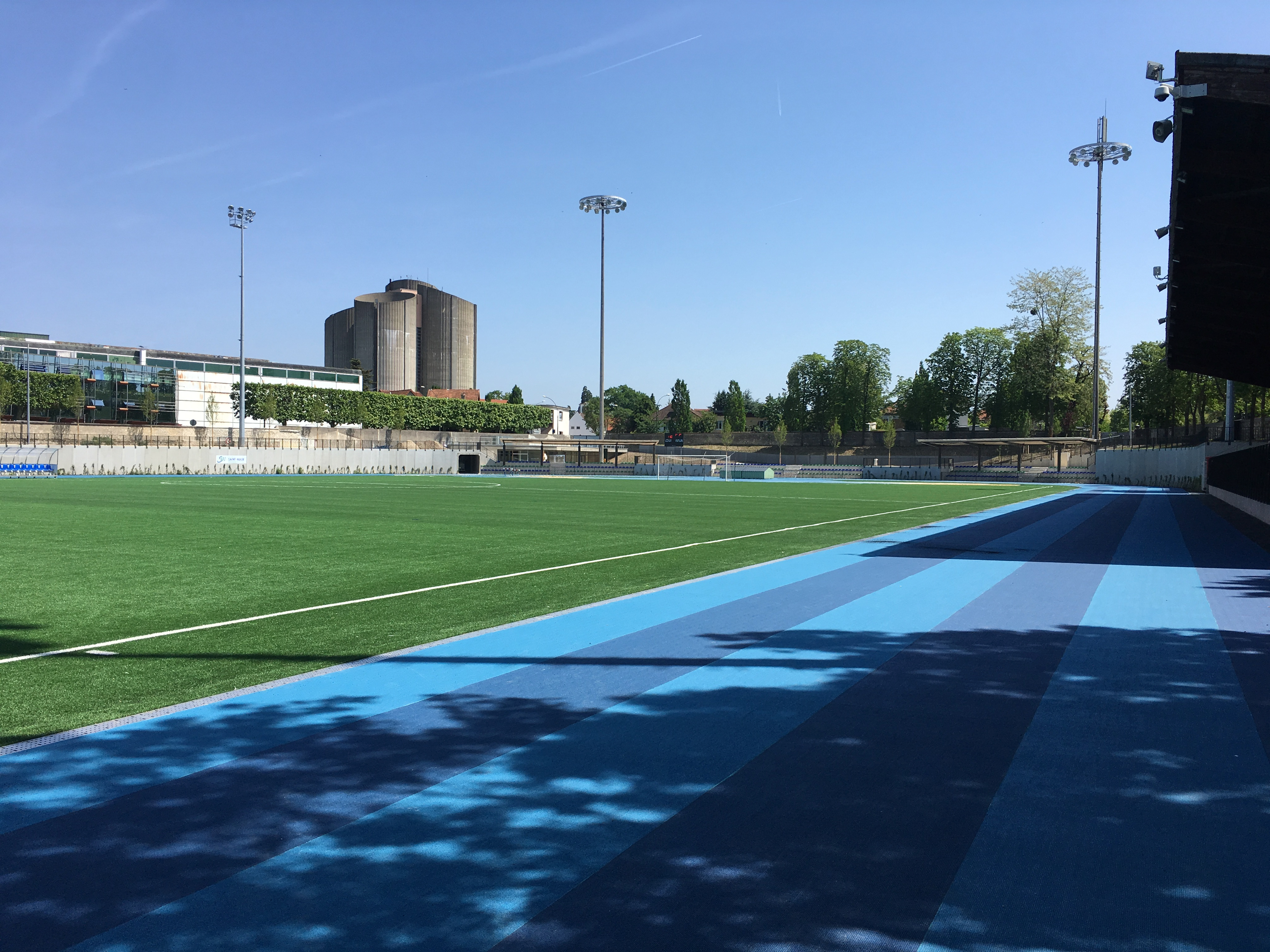 Stade Adolphe-Chéron, stade de football et d'athlétisme situé à Saint-Maur-des-Fossés, dans le Val-de-Marne.